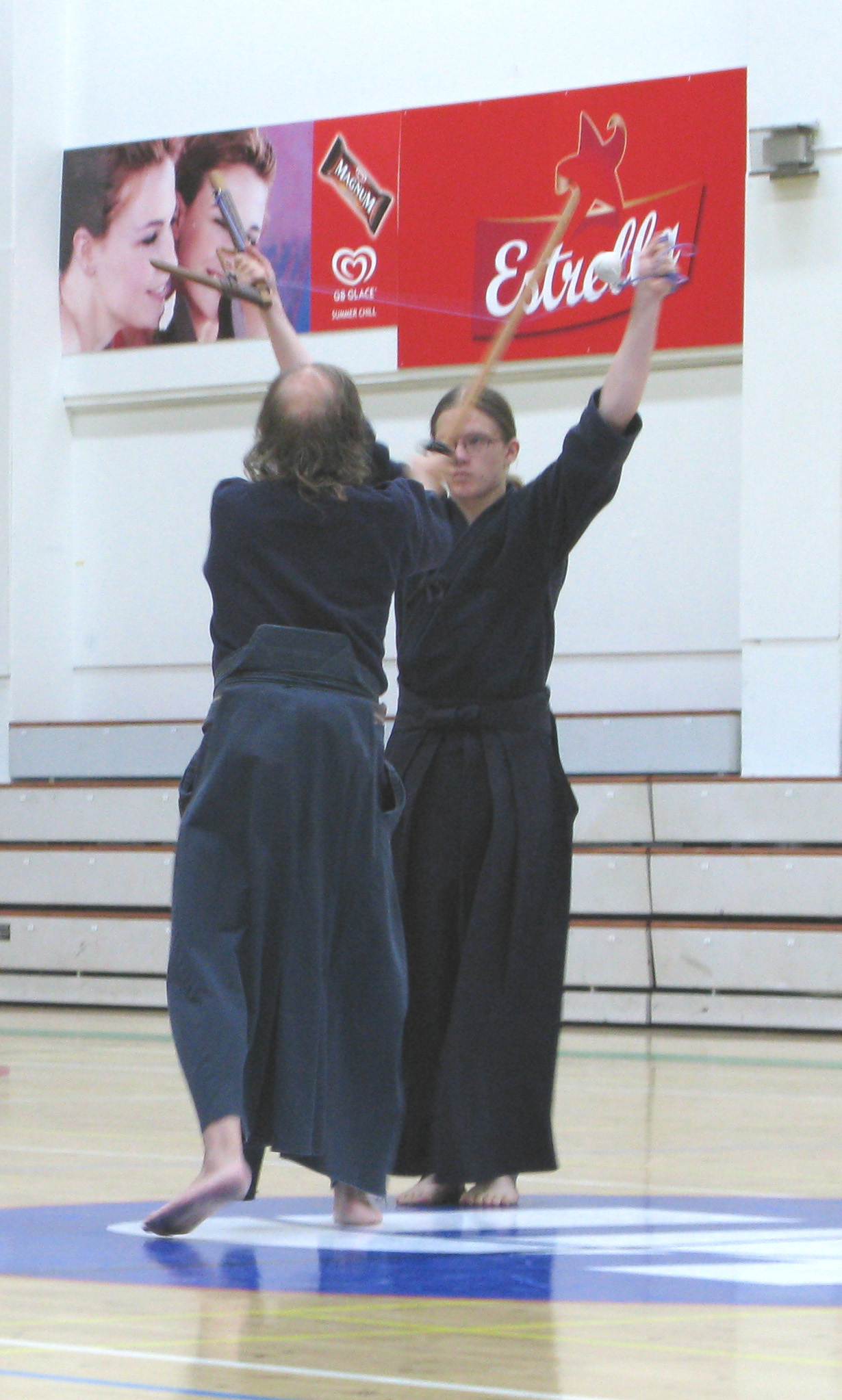 Description